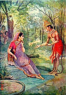 अशोक वाटिकेत हनुमान-सीता भेट